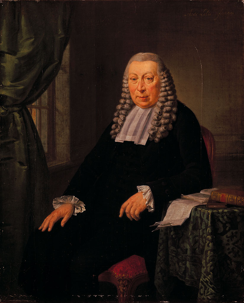 schilderij; burgemeester van Amsterdam; portret; portret Amsterdam; mansportret; Hooft, Hendrik Danielsz.